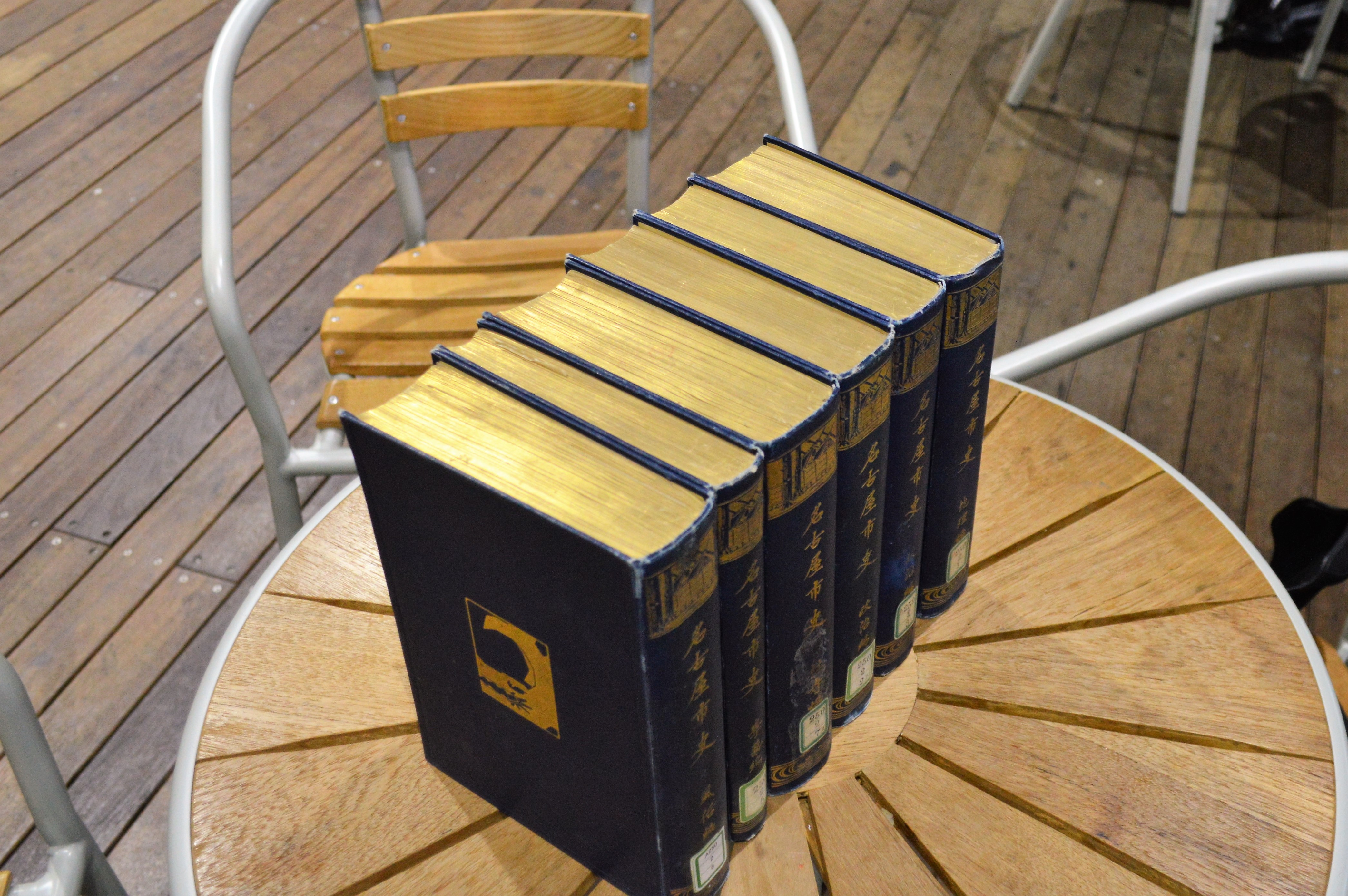 名古屋市が刊行した『名古屋市史』（1915年-1916年、もっとも古い名古屋市史）の一部。金付けが施されている。